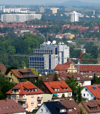 SWR-Funkhaus an der Neckarstraße in Stuttgart eigenes Foto / alle Rechte freigegeben